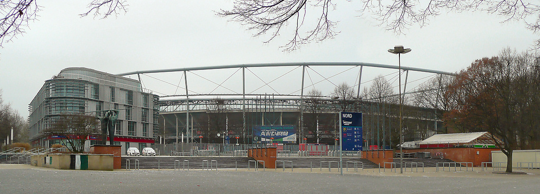 Eingang AWD Arena Hannover